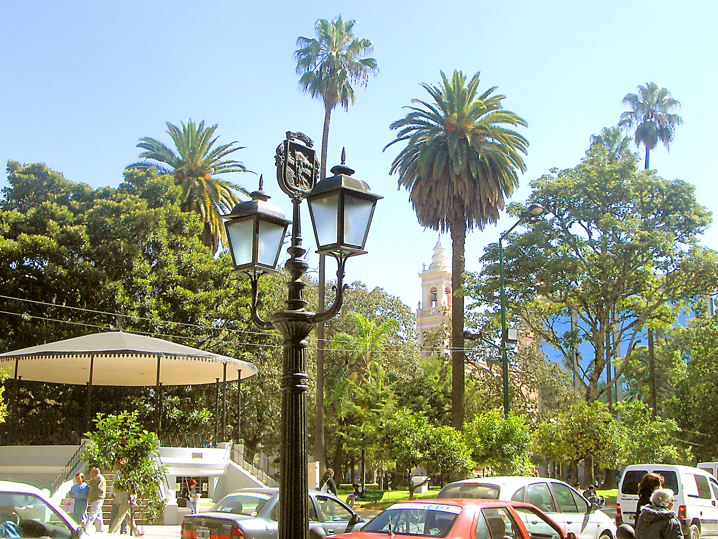 9 de Julio Plaza, Salta, Argentina.